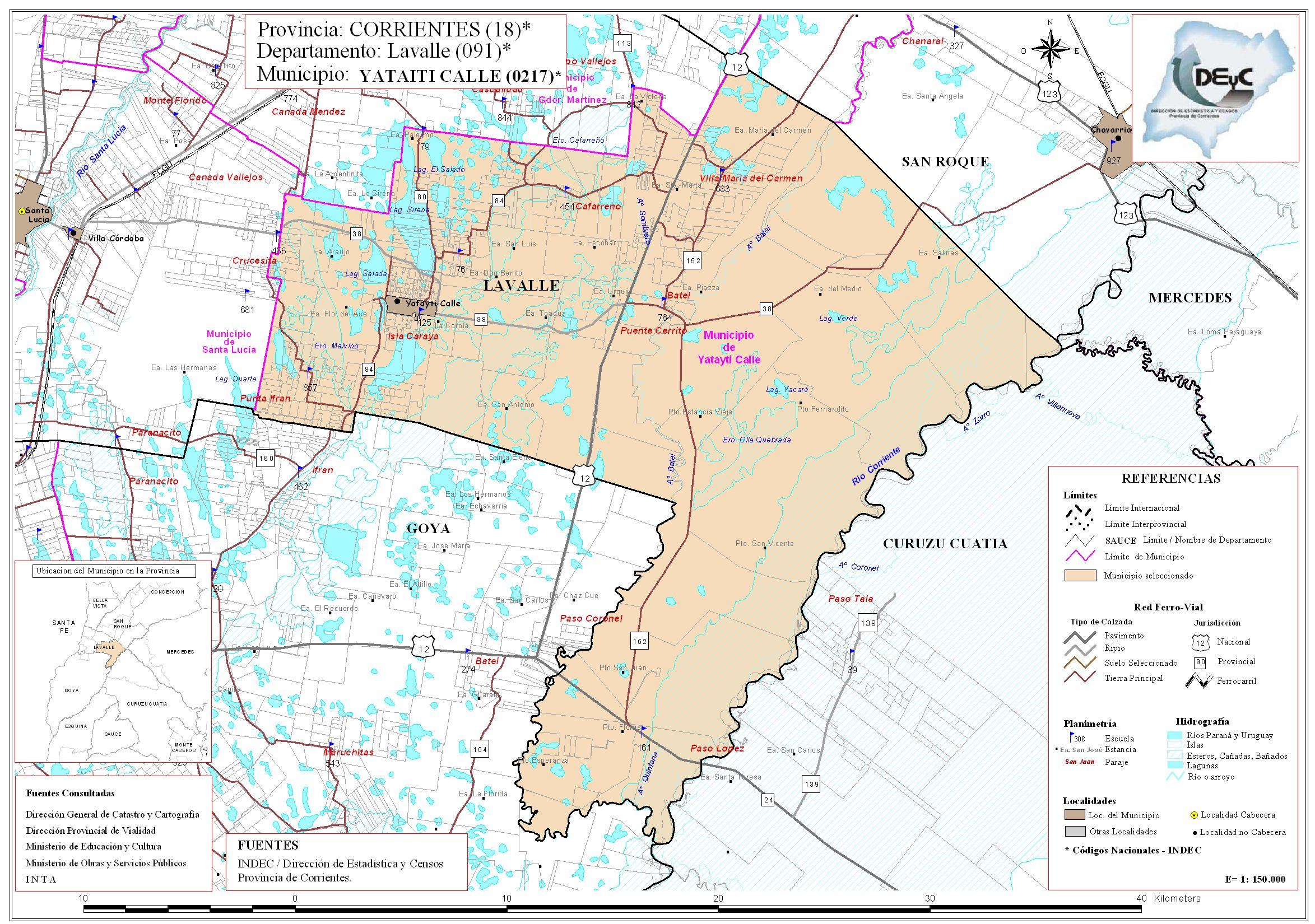 Mapa del Municipio de Yatay Tí Calle